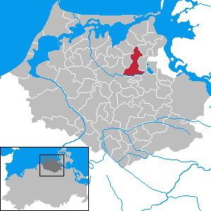 Niepars in Mecklenburg-Vorpommern - District Nordvorpommern